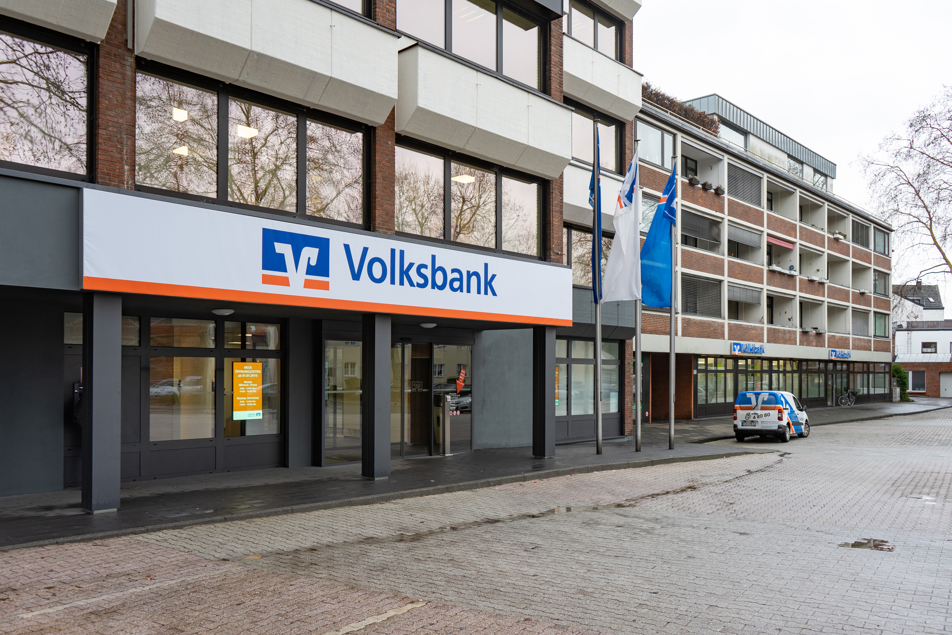 Haupstelle der Volksbank Viersen eG